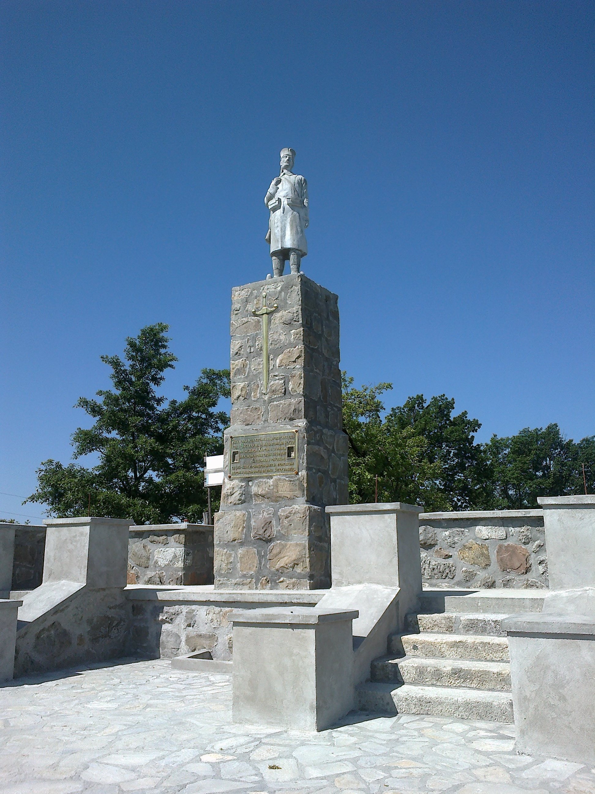 Srpski (latinica): Spomenik se nalazi na Gledickim planinama,tj. Adine livade,u selu Cestin